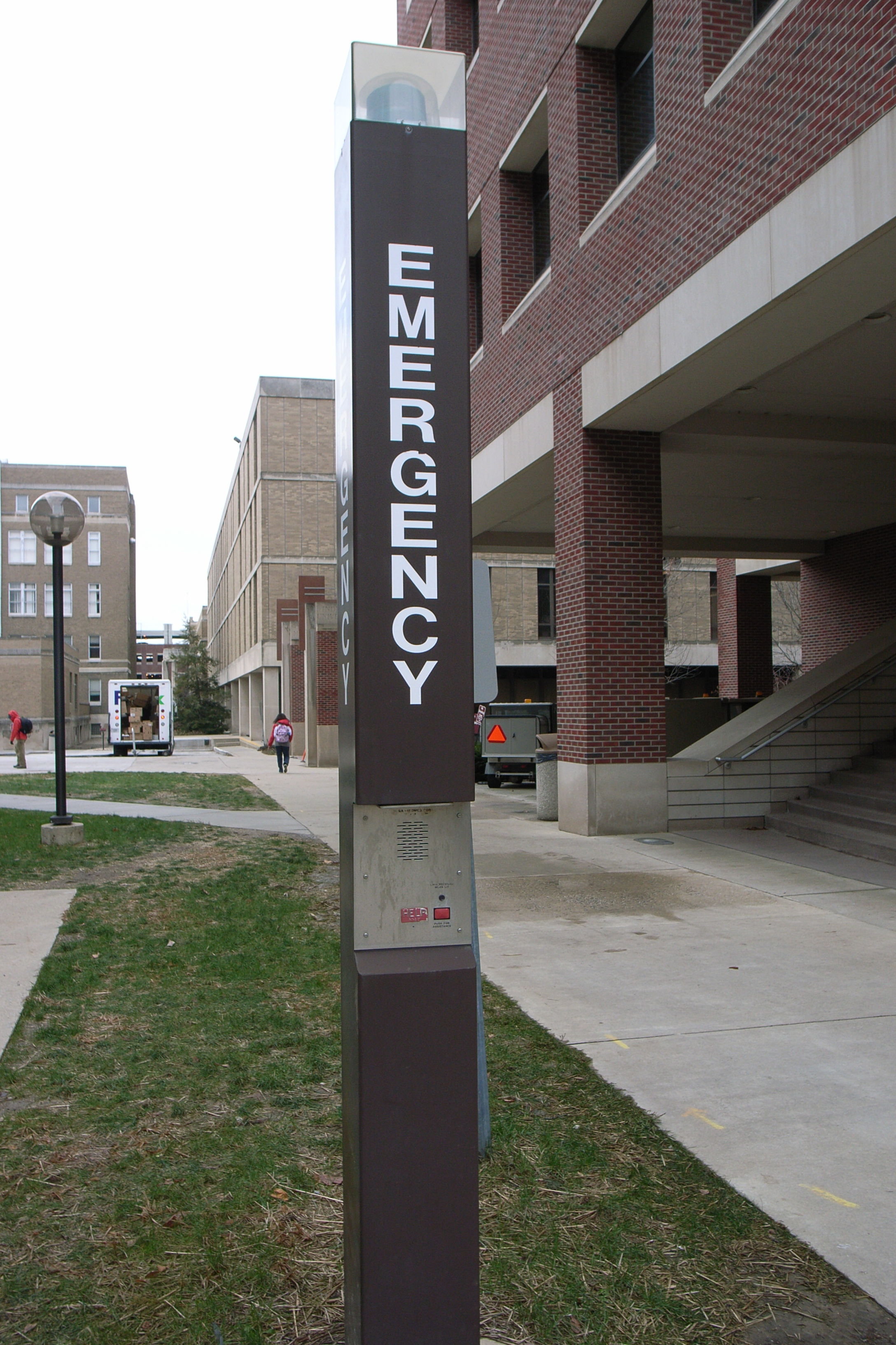 R0020071